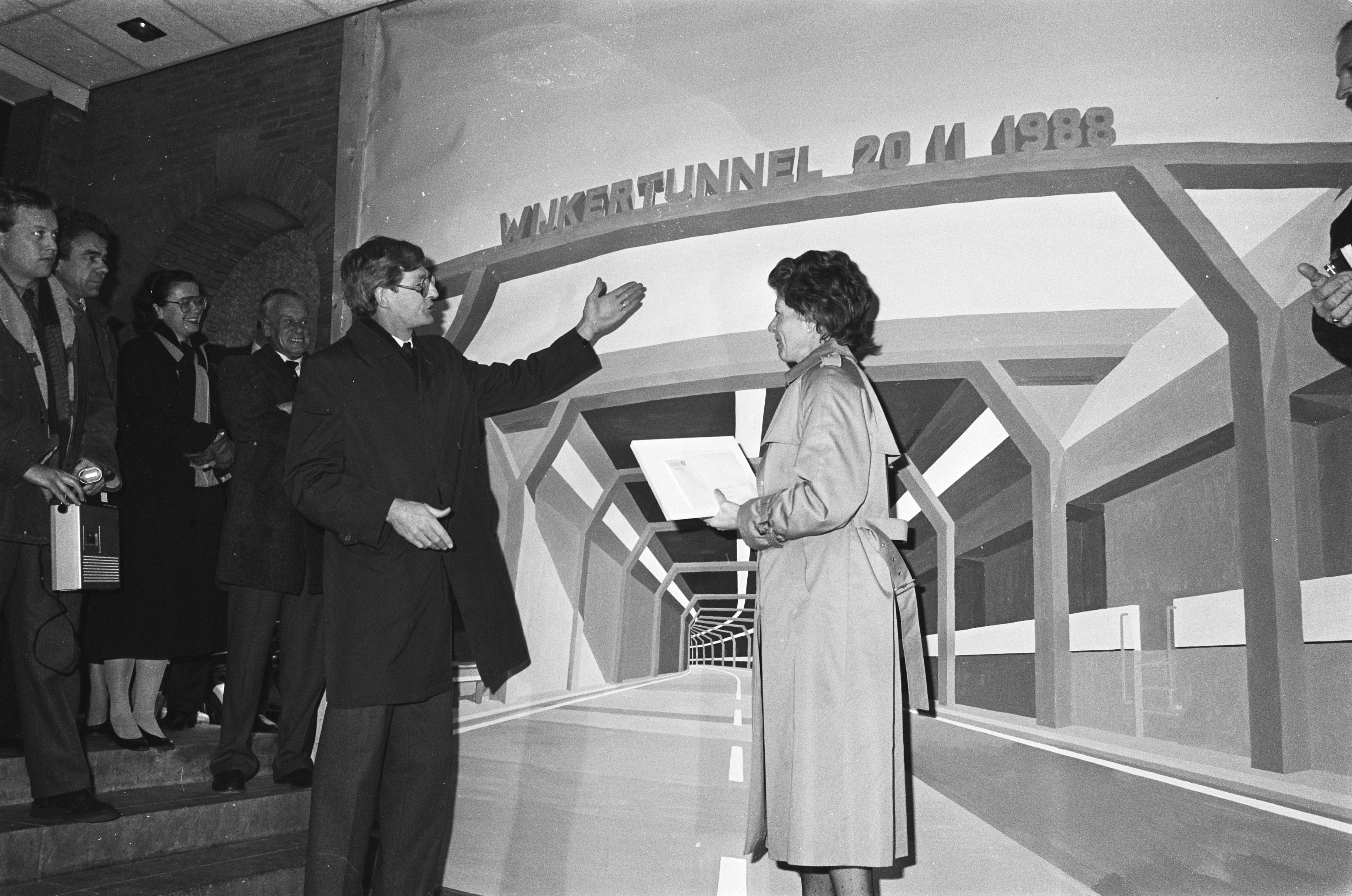 Collectie / Archief : Fotocollectie Anefo Reportage / Serie : [ onbekend ] Beschrijving : Smit Kroes bij schildering toekomstige Wijktertunnel in provinciehuis Noord Holland ; burgemeester Hoobroeckx van Heemskerk Datum : 20 november 1985 Trefwoorden : PROVINCIEHUIZEN, burgemeesters, schilderingen, tunnels Persoonsnaam : Smit-Kroes, Neelie Fotograaf : Molendijk, Bart / Anefo Auteursrechthebbende : Nationaal Archief Materiaalsoort : Negatief (zwart/wit) Nummer archiefinventaris : bekijk toegang 2.24.01.05 Bestanddeelnummer : 933-4894